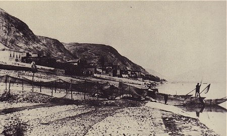 Il lago Fucino nei pressi di Luco dei Marsi (1860)